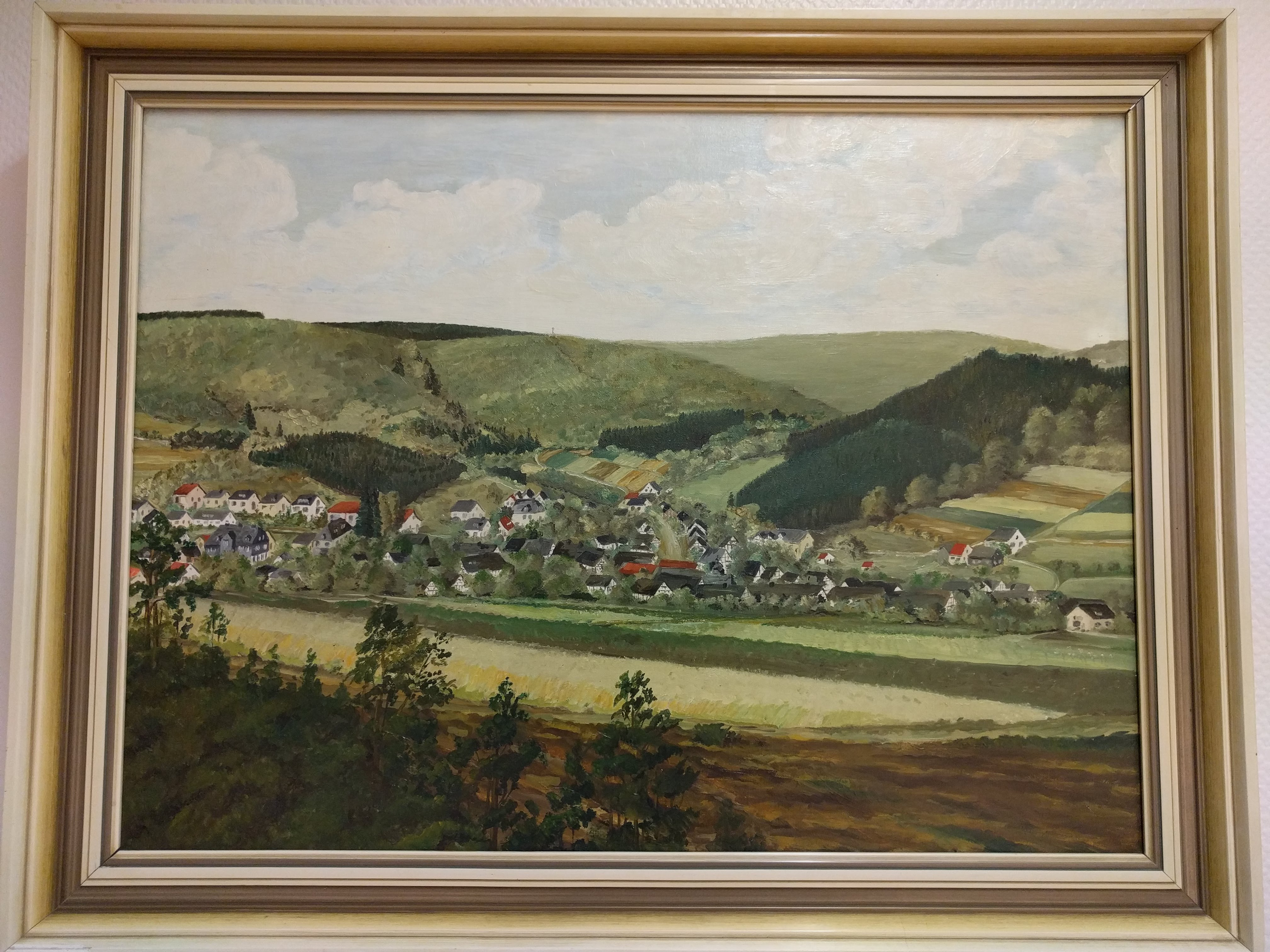 Öl auf Leinwand.